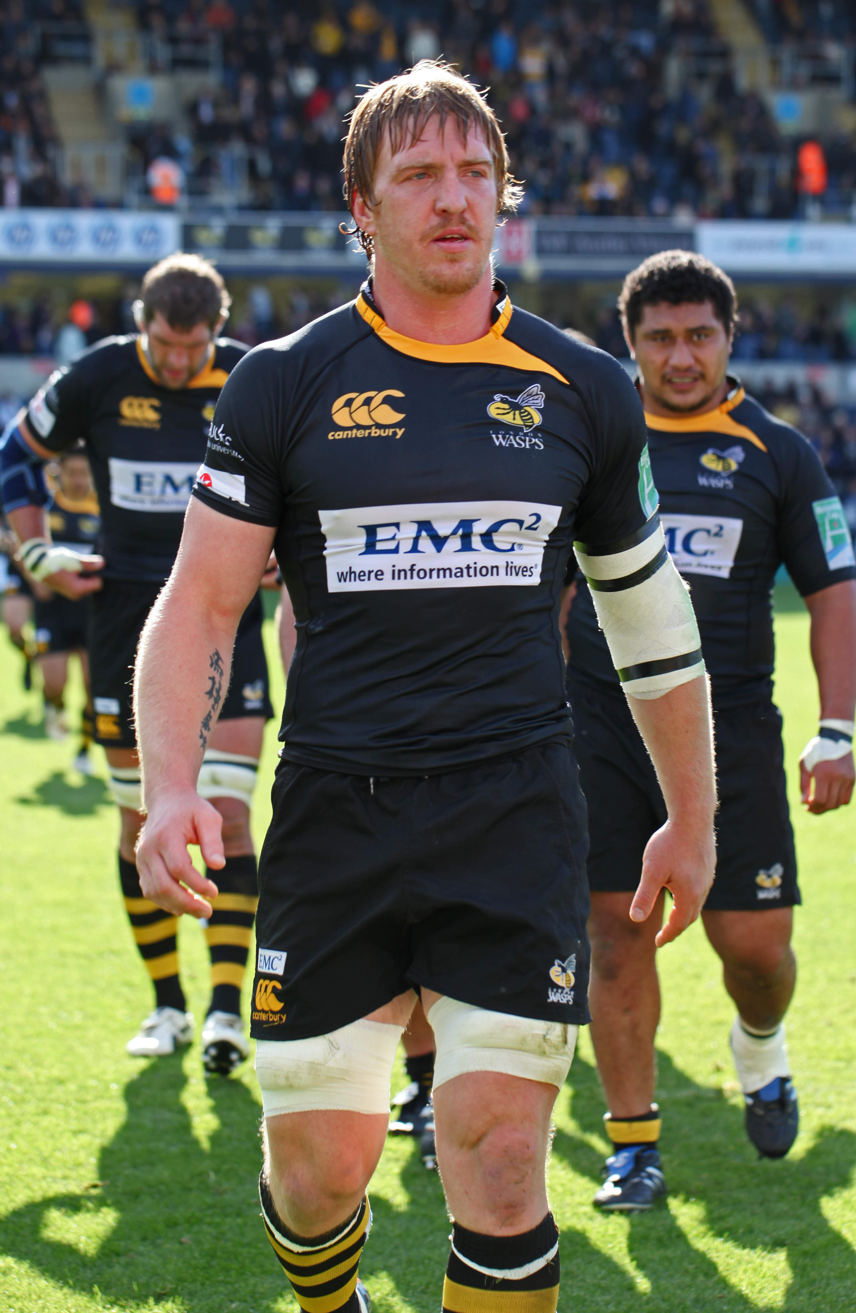 Andy Powell. 3ème ligne des London Wasps